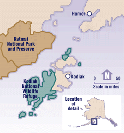 Map of Alaska: Kodiak Island